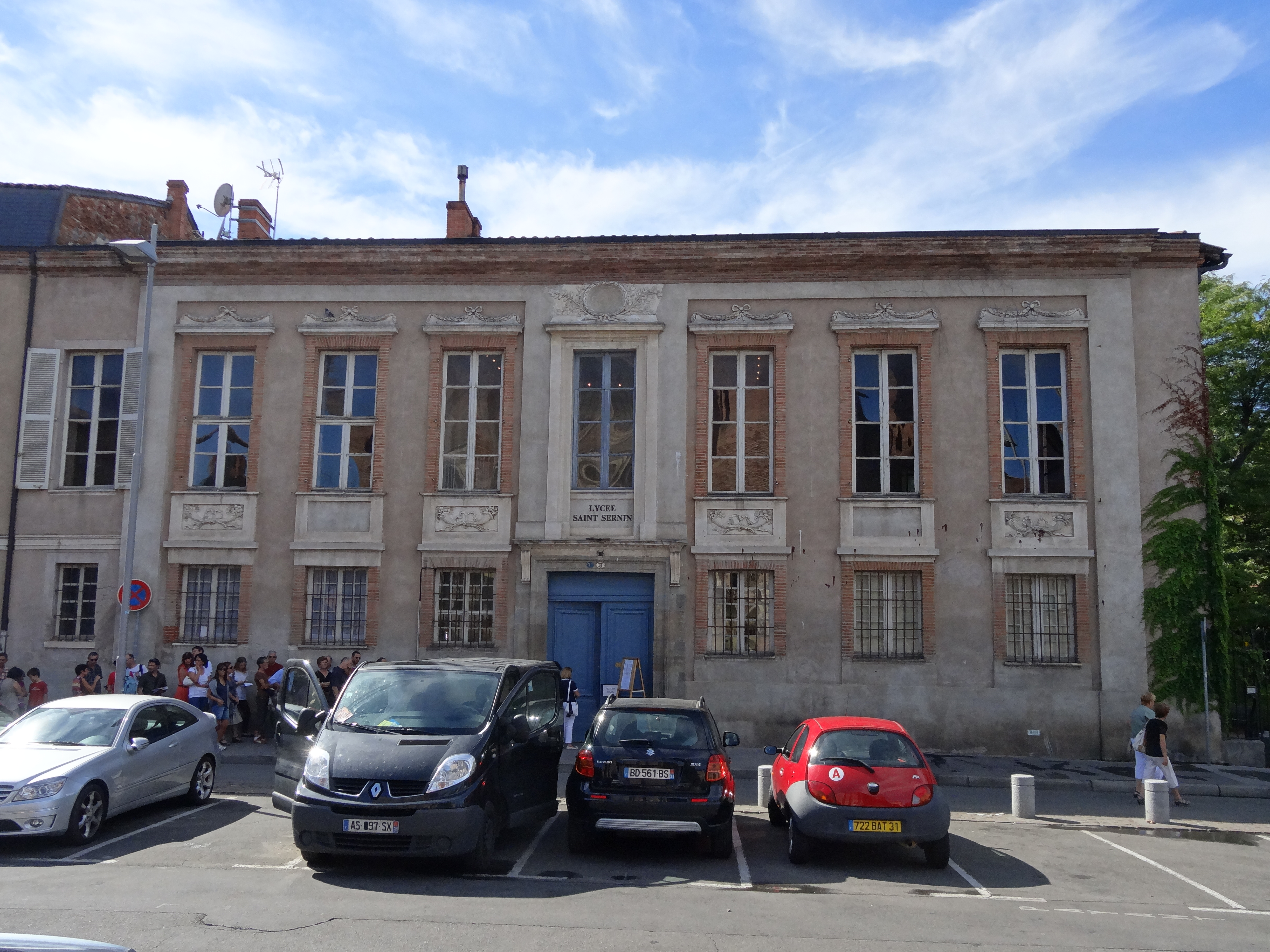 Lycée Saint-Sernin (hôtel Dubarry), Toulouse .